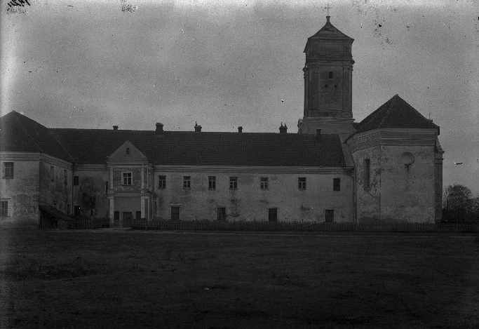 Заслав. Бернардинський монастир із сходу.